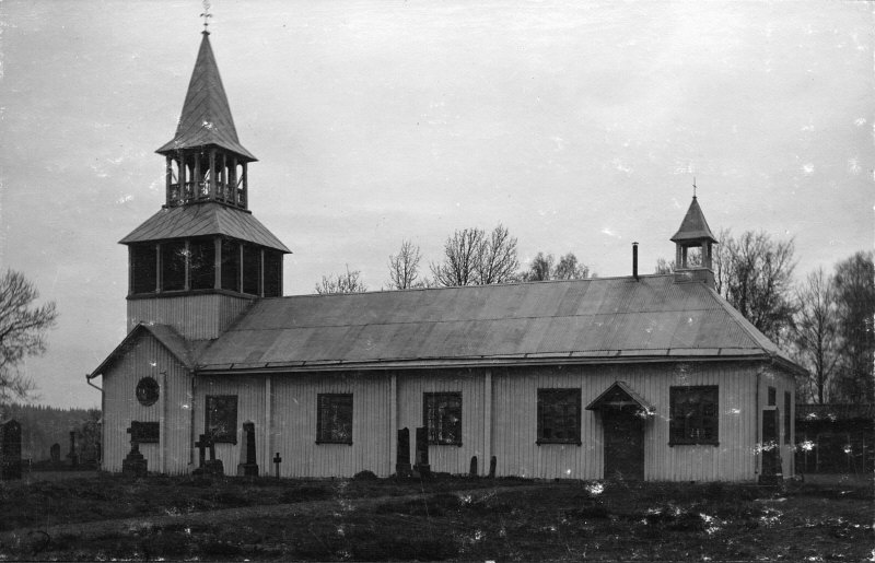 Ödskölts kyrka